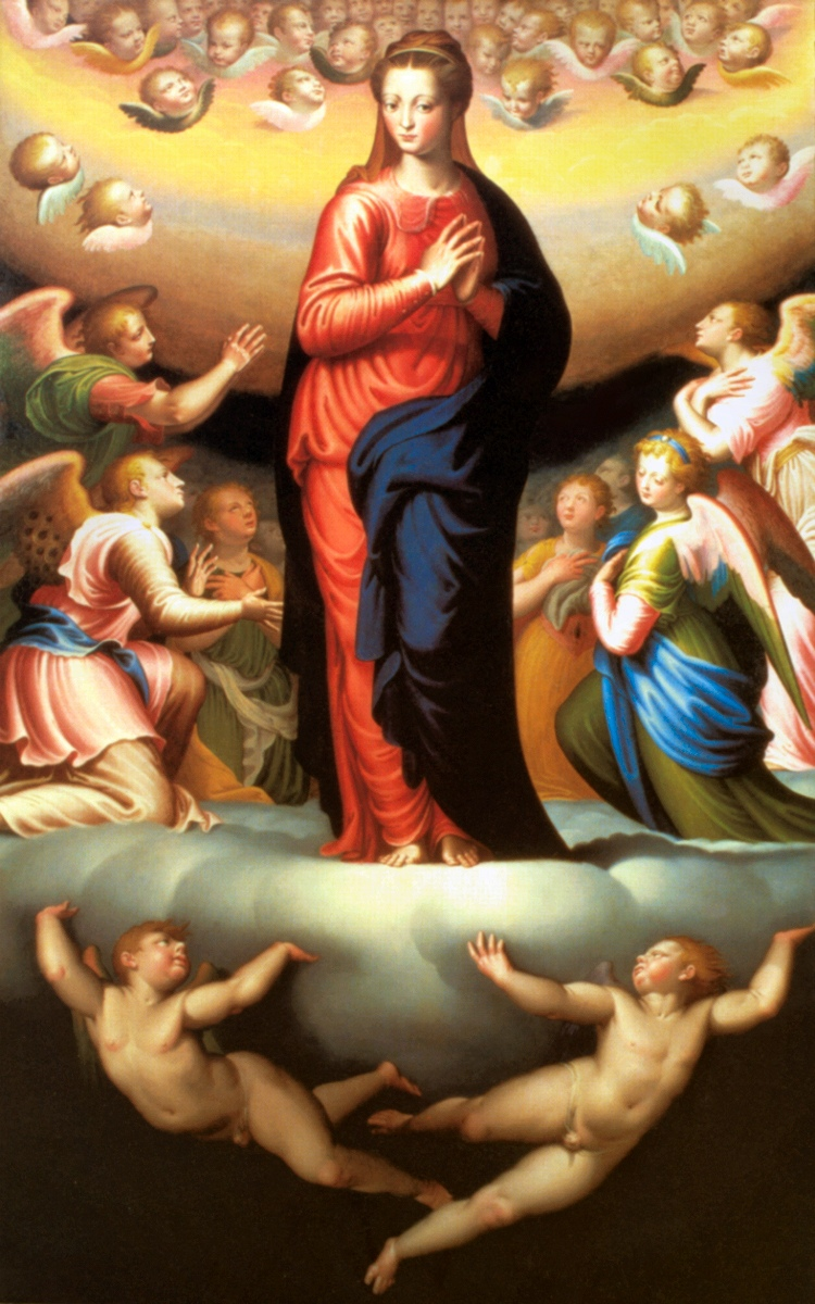 Madonna in Glory